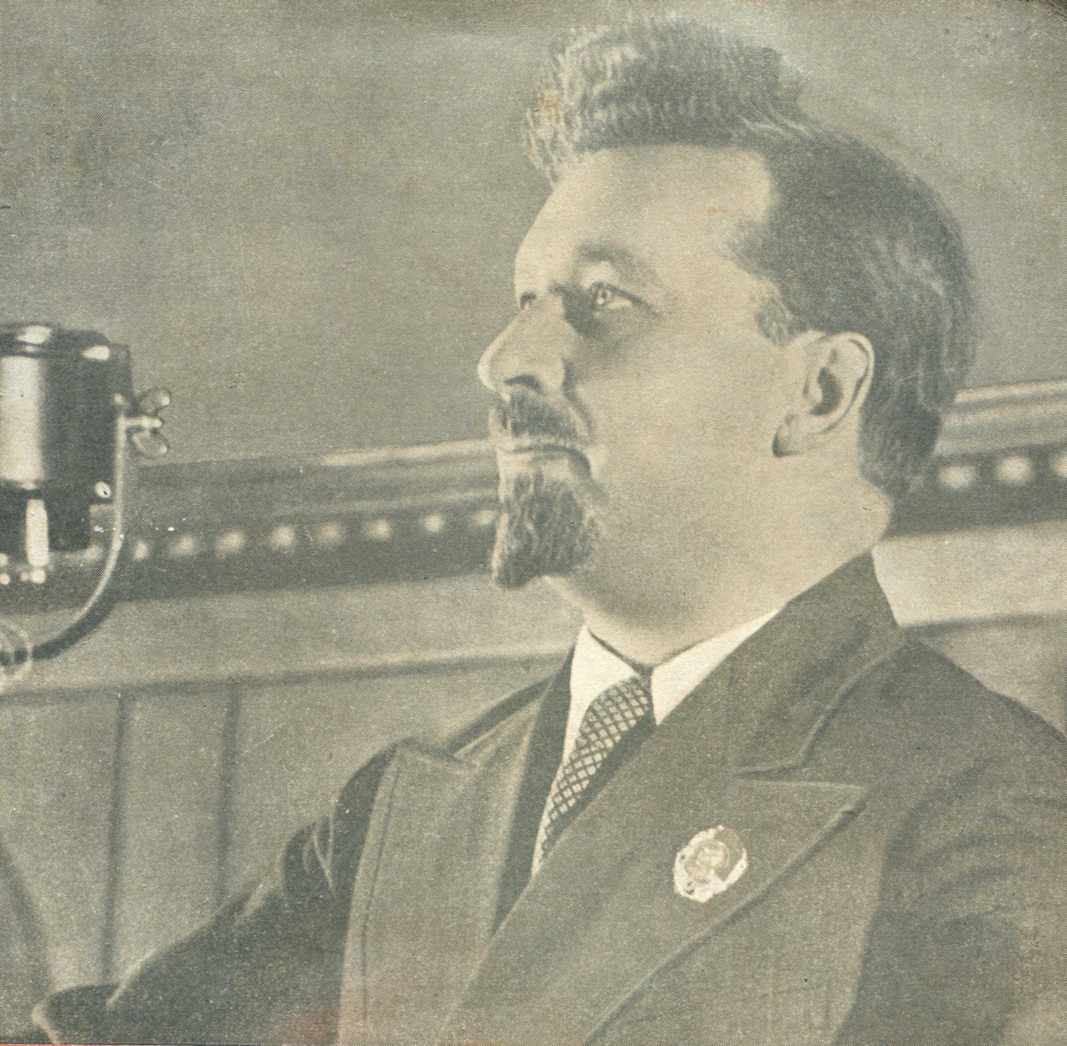 П. П. Любченко, Киев, 1936 год